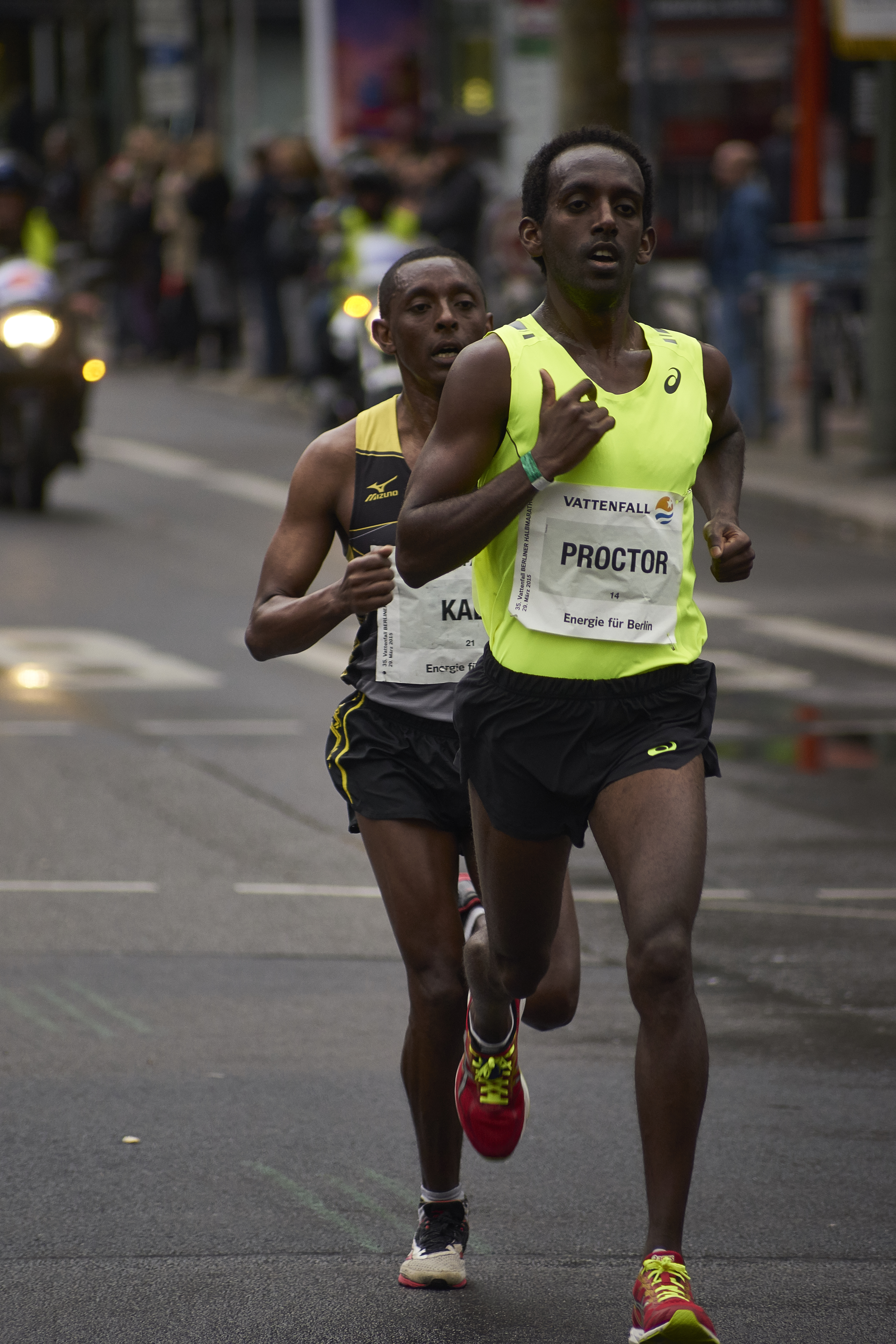 Berliner Halbmarathon 2015, Gabe Proctor & Nesero Kadi